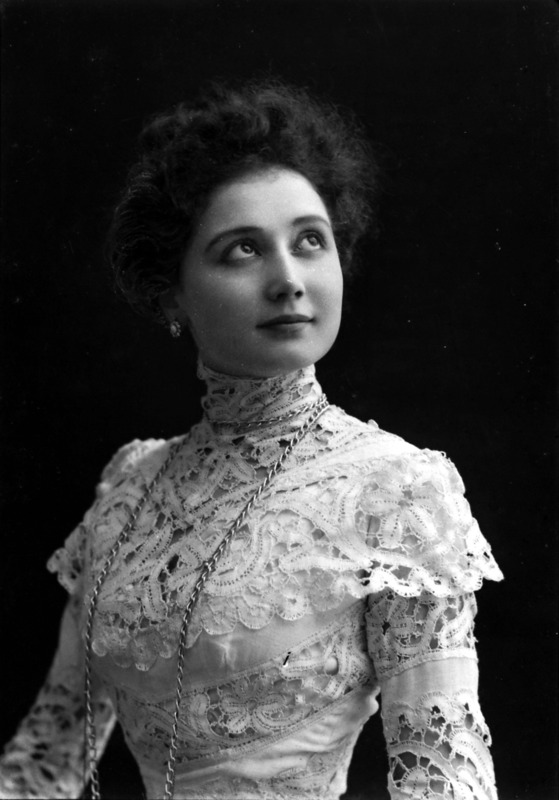 Attrice teatrale e cinematografica Tilde Teldi